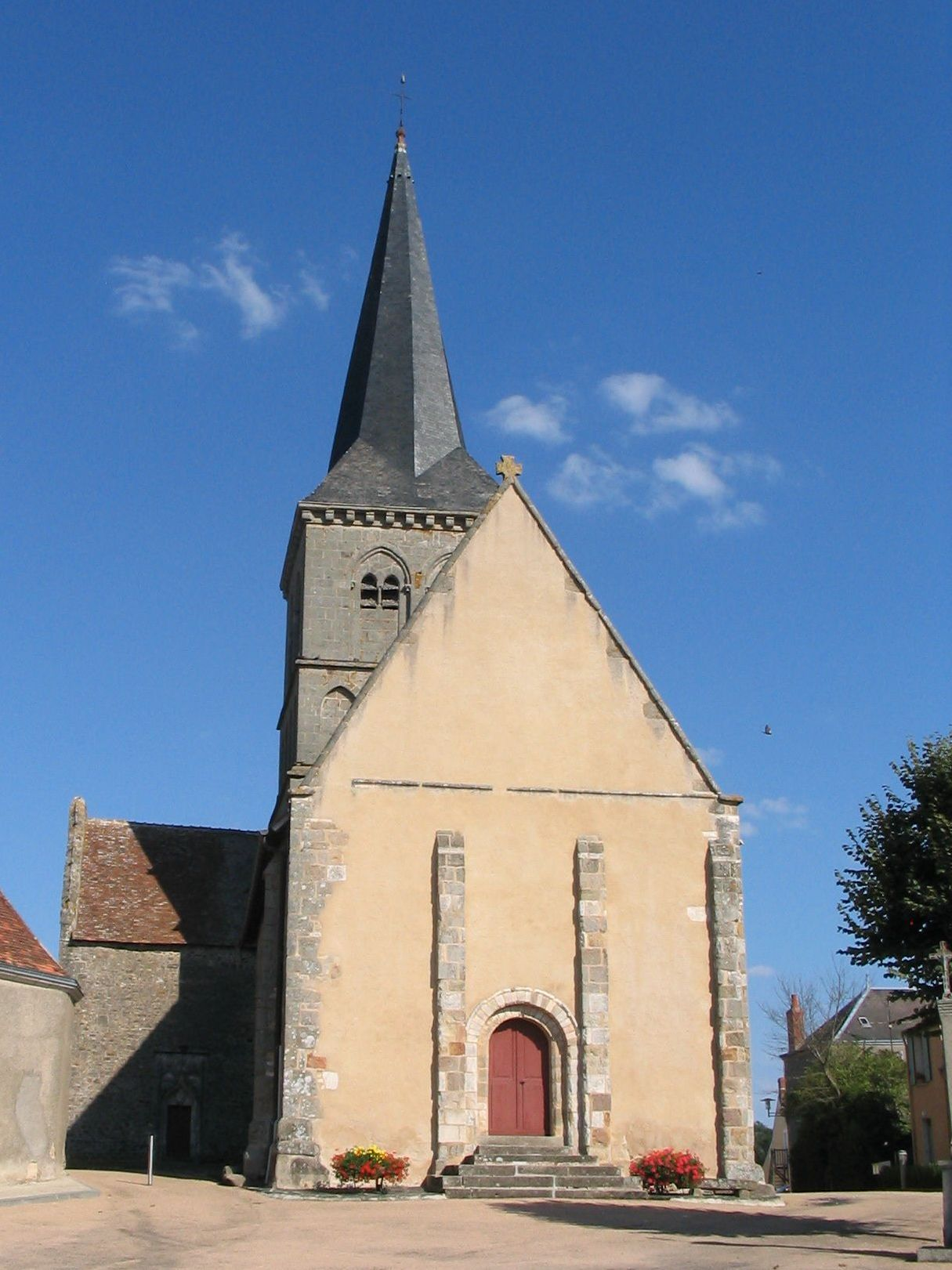 église saint-Étienne à Chassignolles (Indre-France)